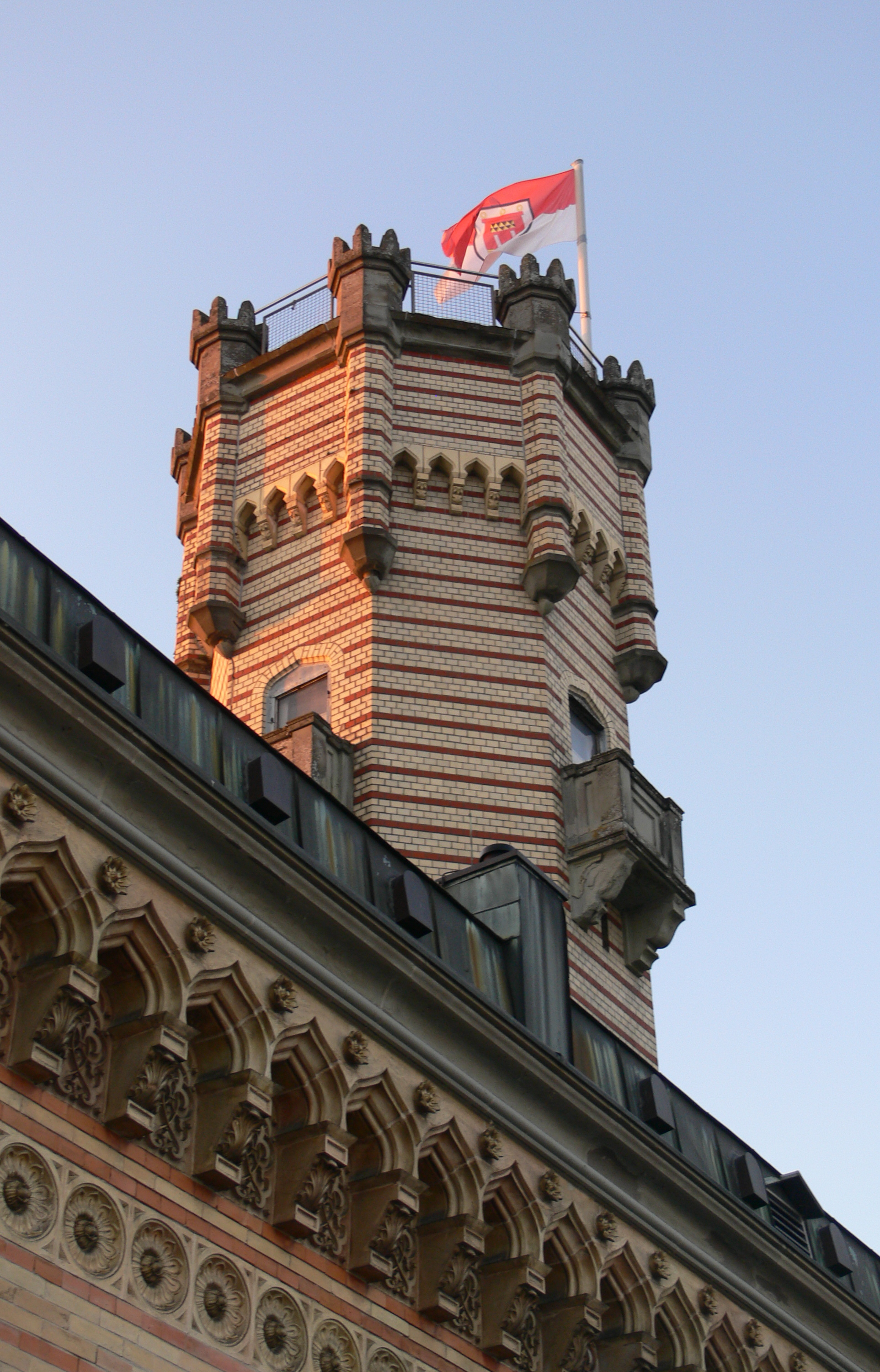 Langenargen, Schloss Montfort, Turm